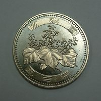 Description de l'image : Monnaie yen 500 face